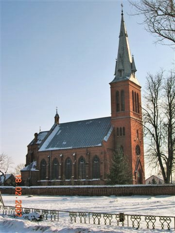 Parafia p.w. św. Antoniego i Objawienia Pańskiego w Kamionce, Białoruś